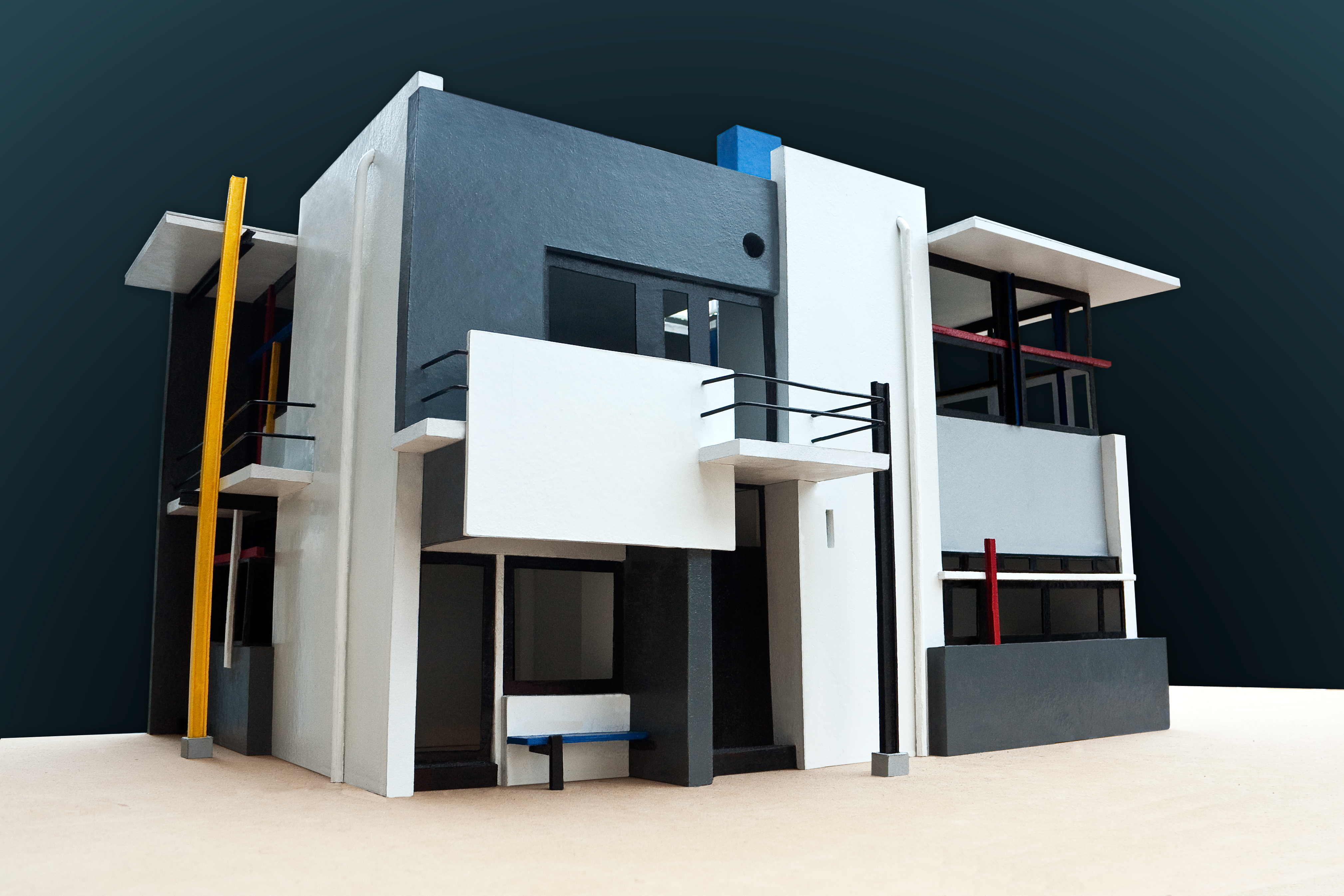 Gerrit Rietveld, Maison Schröder, Maquette